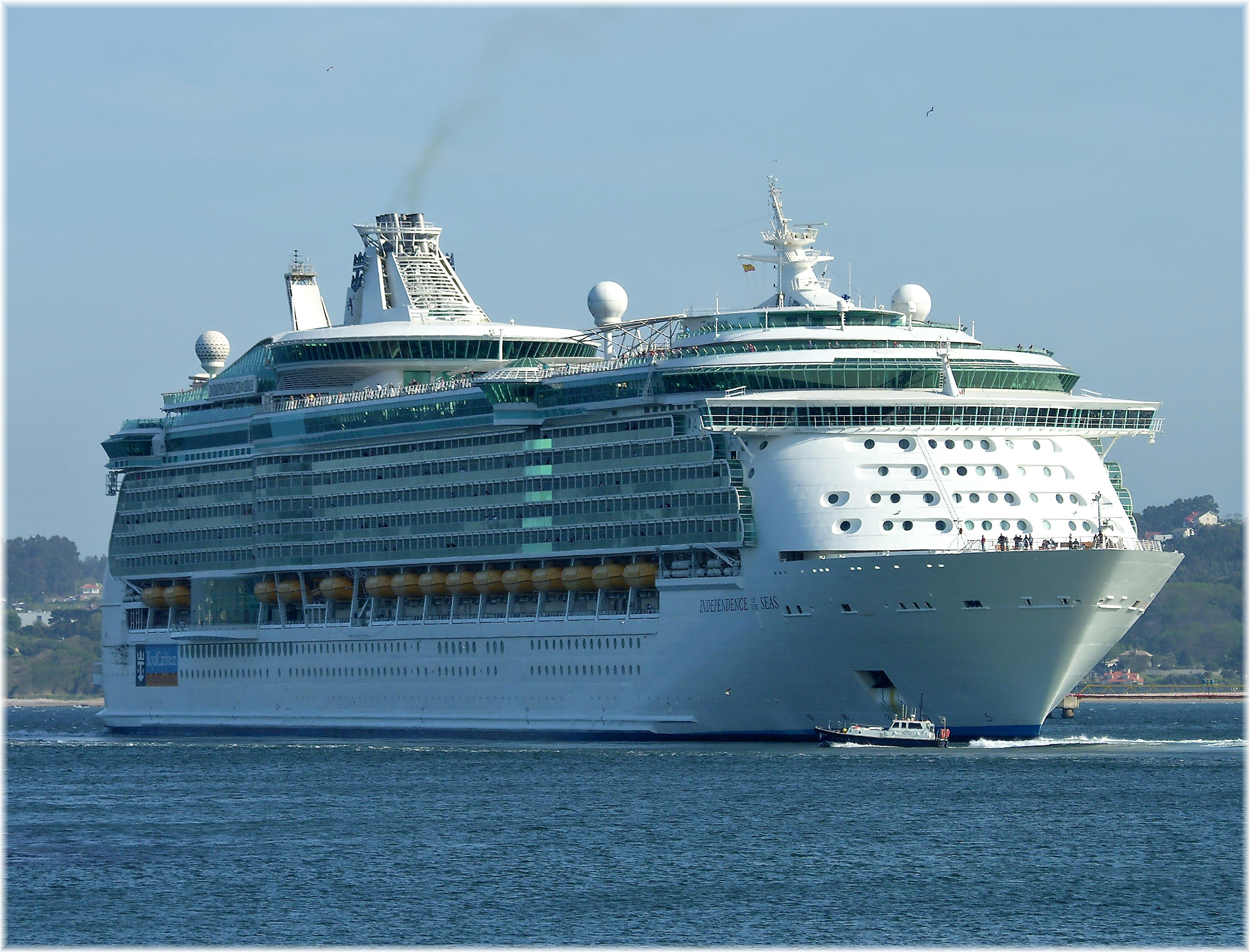 Independence of the Seas es un barco de tipo crucero. Fue el más grande del mundo junto al Liberty of the Seas y el Freedom of the Seas, hasta que fue construido el MS Oasis of the Seas. Este crucero fue construido en Turku, Finlandia. Su nombre en español significa «Independencia de los Mares». Propiedad de la compañía Royal Caribbean International. Puede acomodar 4.370 pasajeros y una tripulación de 1.360 miembros. Es el último de la Clase Freedom. La siguiente generación es la Clase Génesis, siendo el primero de esta clase el barco MS Oasis of the Seas, que inició su primer viaje el día 1 de noviembre de 2009. Opera desde Southampton, Inglaterra Wikipedia.